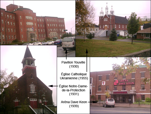 Édifices de briques à Rouyn-Noranda